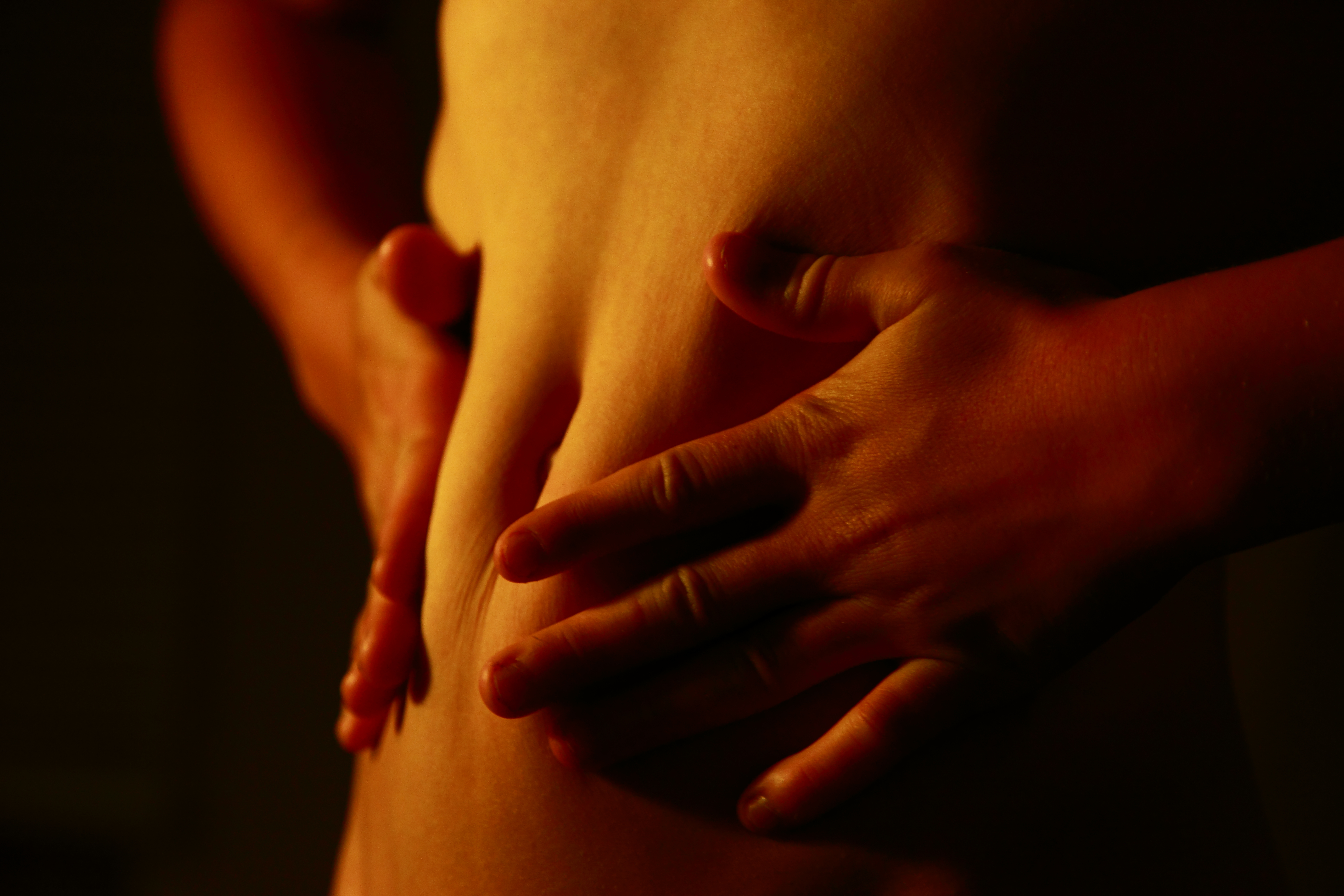 Belly Squeezing